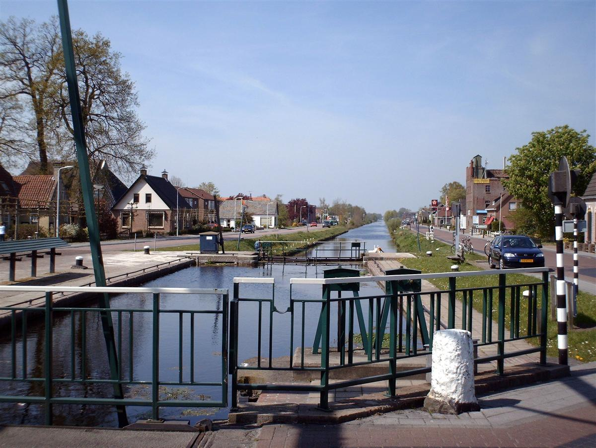 Appelscha, vaart, brug en sluis